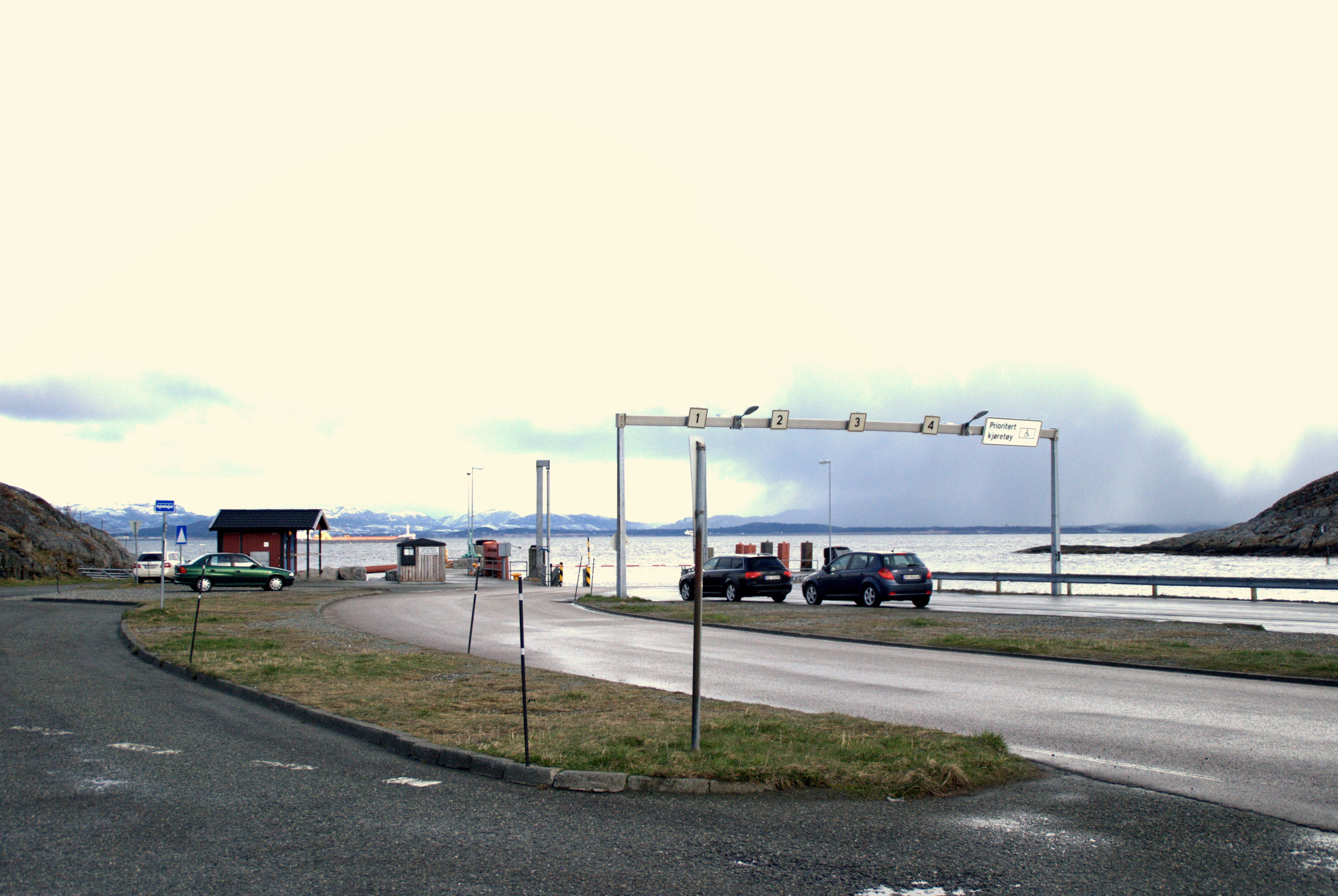 Valset fergekai på Fergesambandet Brekstad–Valset (Fylkesvei 710) ved Agdenes i Sør-Trøndelag.